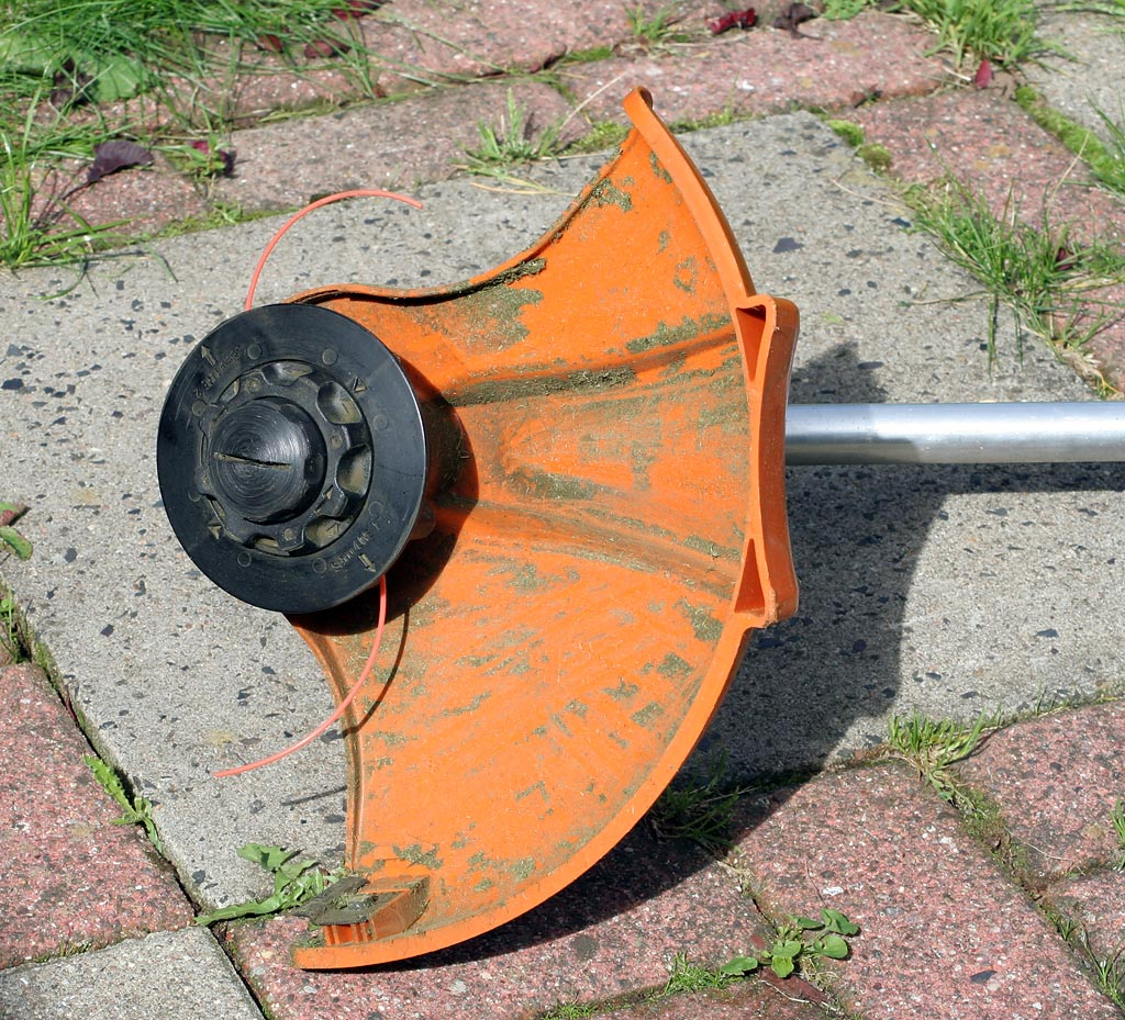 Mähkopf "Autocut" einer Stihl FS38 Motorsense